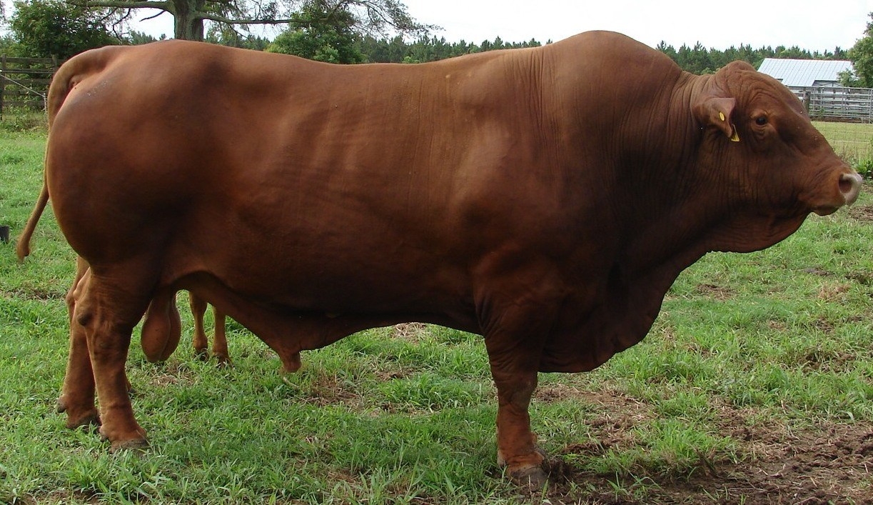 Toro ORL 25M raza Senepol Oak Lane Ranch